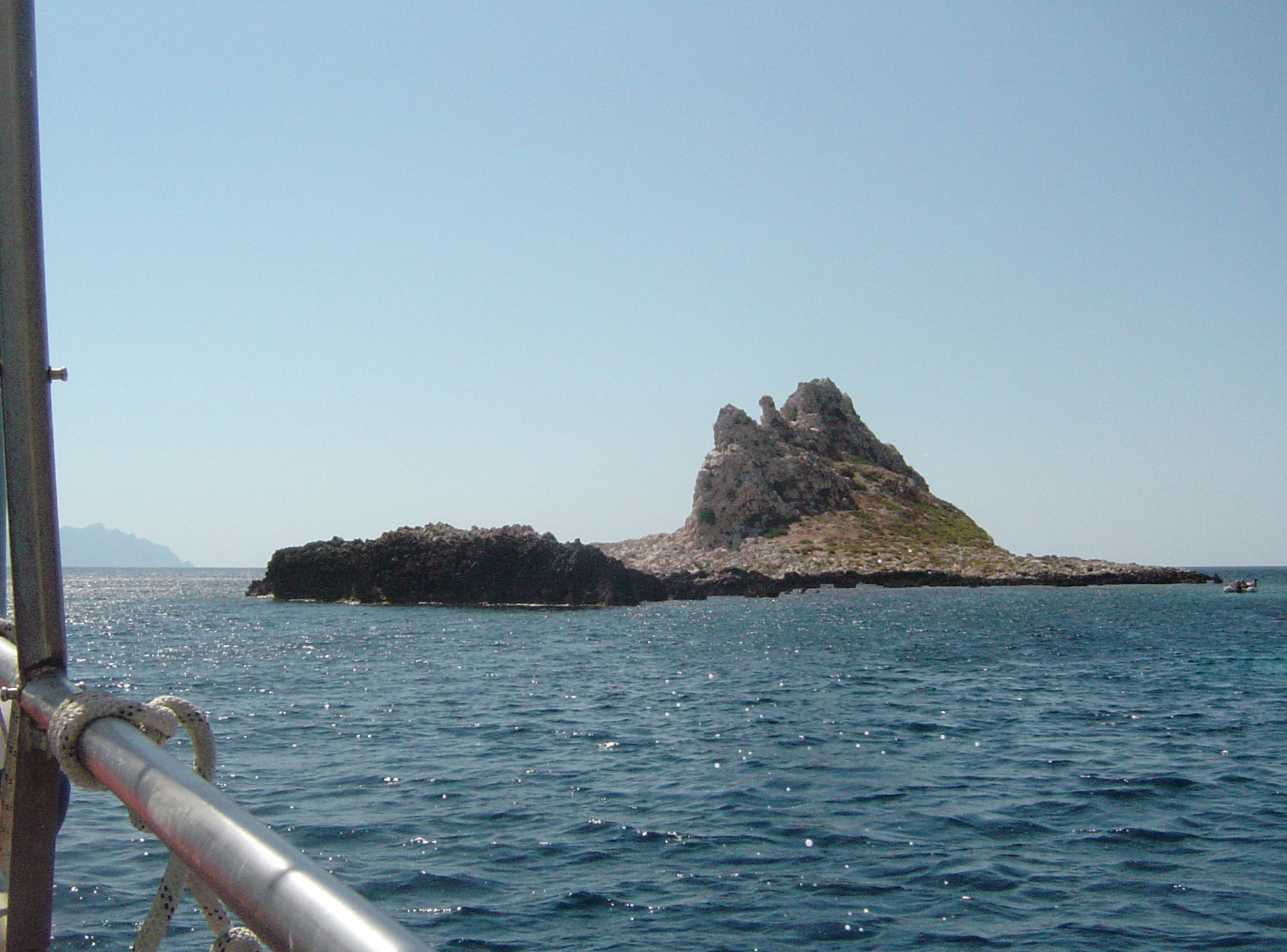 Il Faraglione, Levanzo (TP), Italy